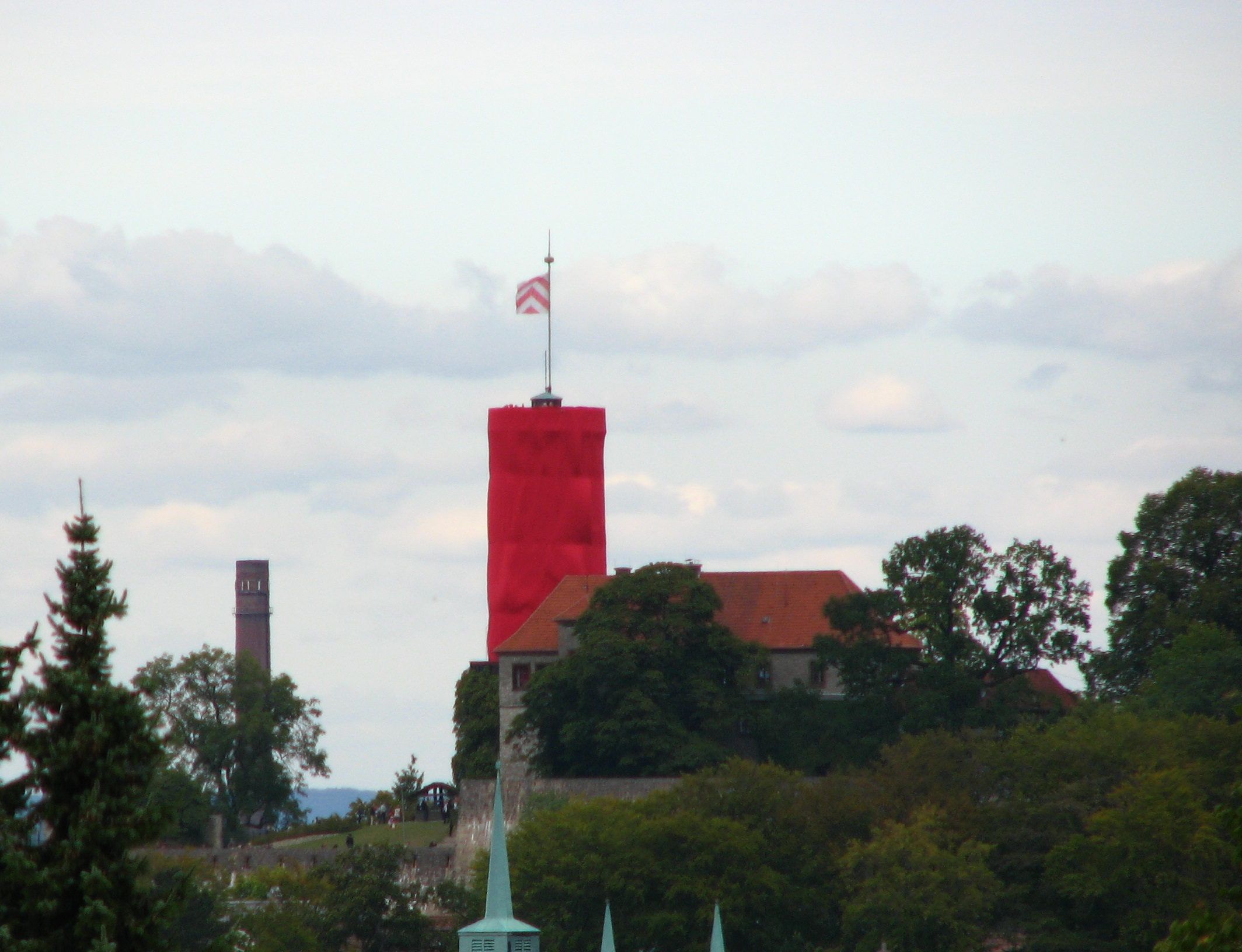 Vom 21.-24. September 2012 wurde anlässlich des 125-jährigen Bestehens der Kreishandwerkerschaft Bielefeld der Turm der Sparrenburg mit rotem Stoff verhüllt.This is a photograph of an architectural monument., no. 3